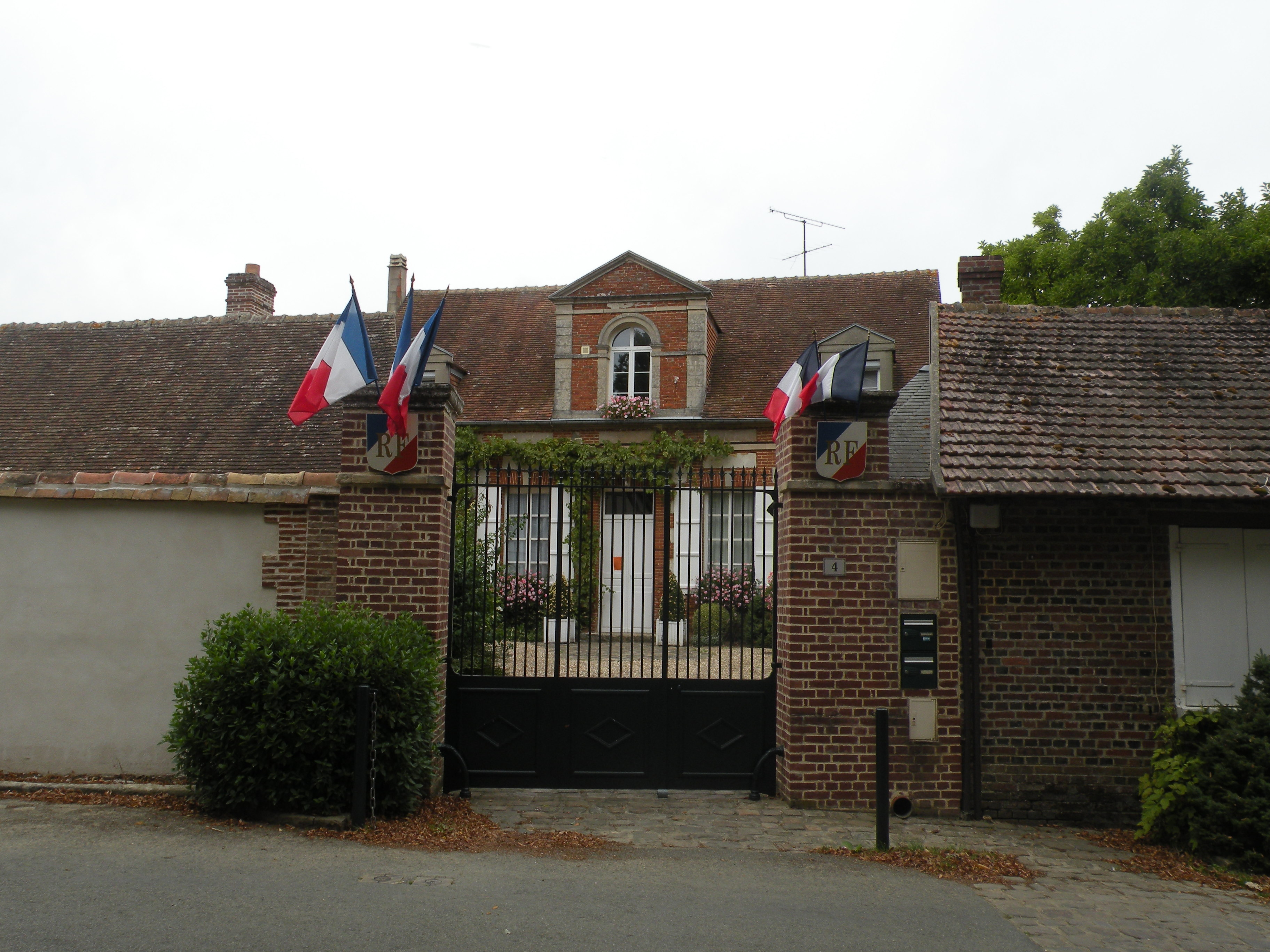 mairie Thibivillers